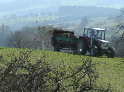 Ein Bauer beim Düngen in Oberndorf/Melk, Mostviertel in Österreich.